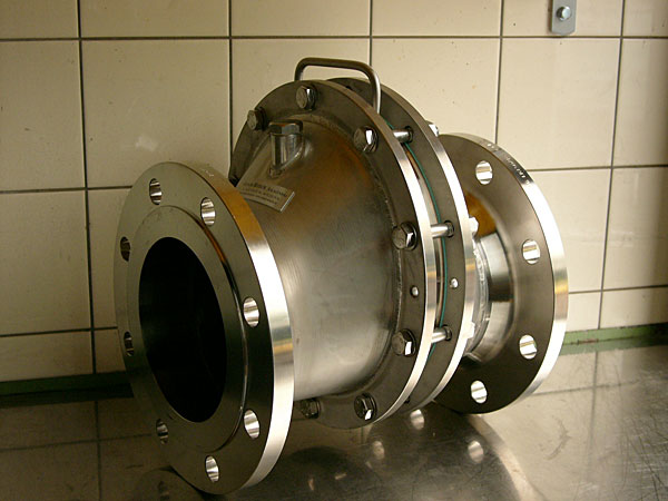 Schaer Hitech Flammendurchschlagsicherung in exzentrischer Bauform, komplett Rostfrei